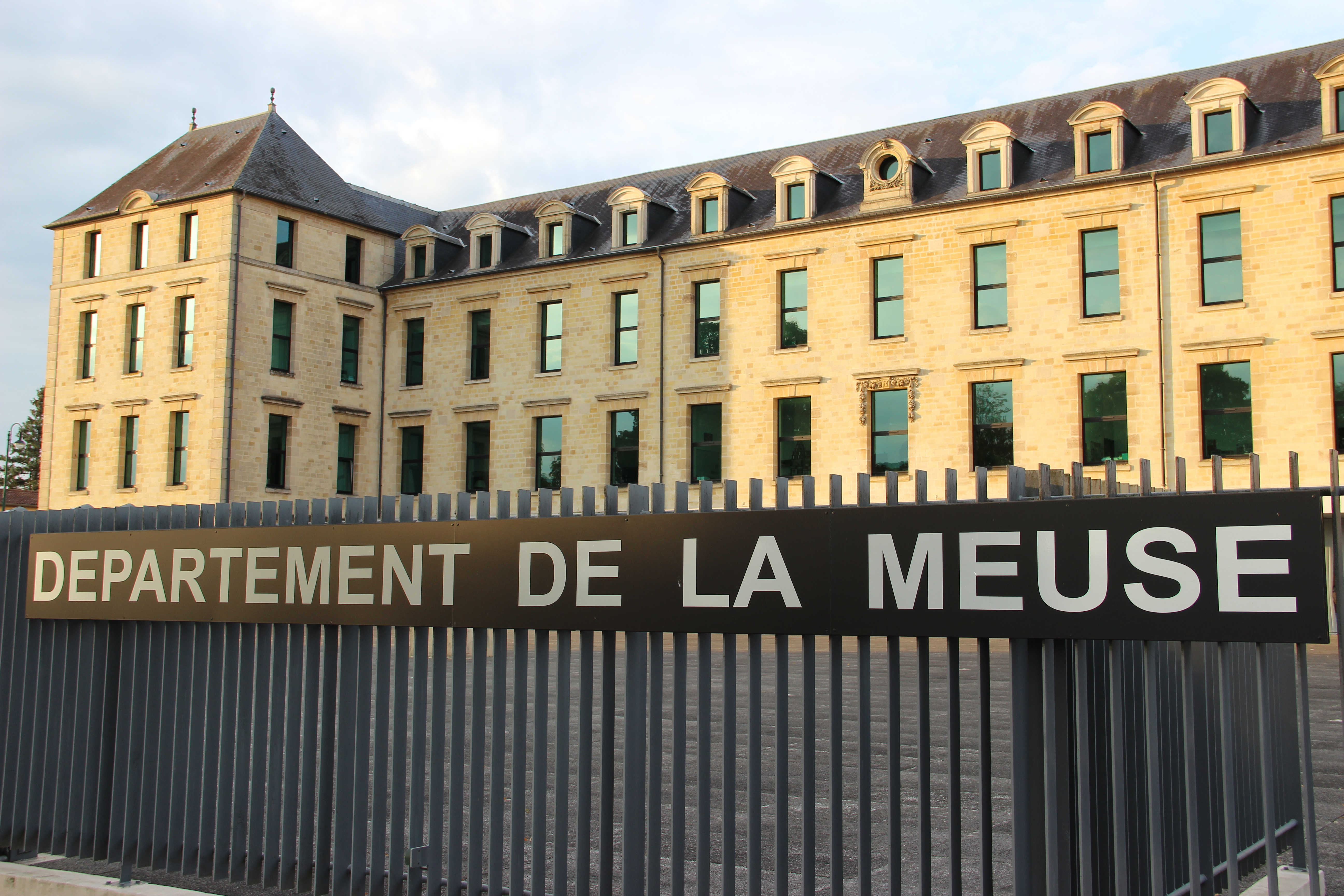 Hôtel du département de la Meuse